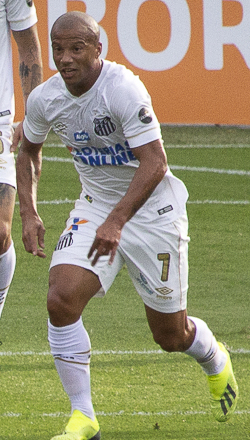 Foto: Douglas Teixeira/Futebol Santista